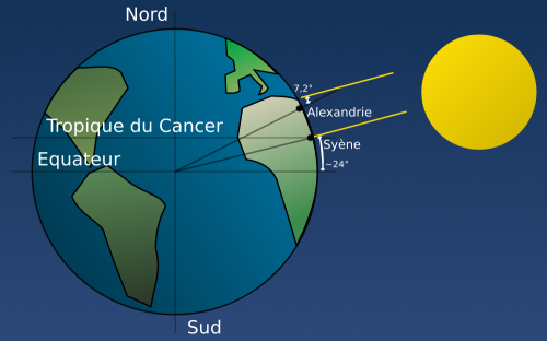 Schema du calcul du périmètre de la Terre selon Eratosthène